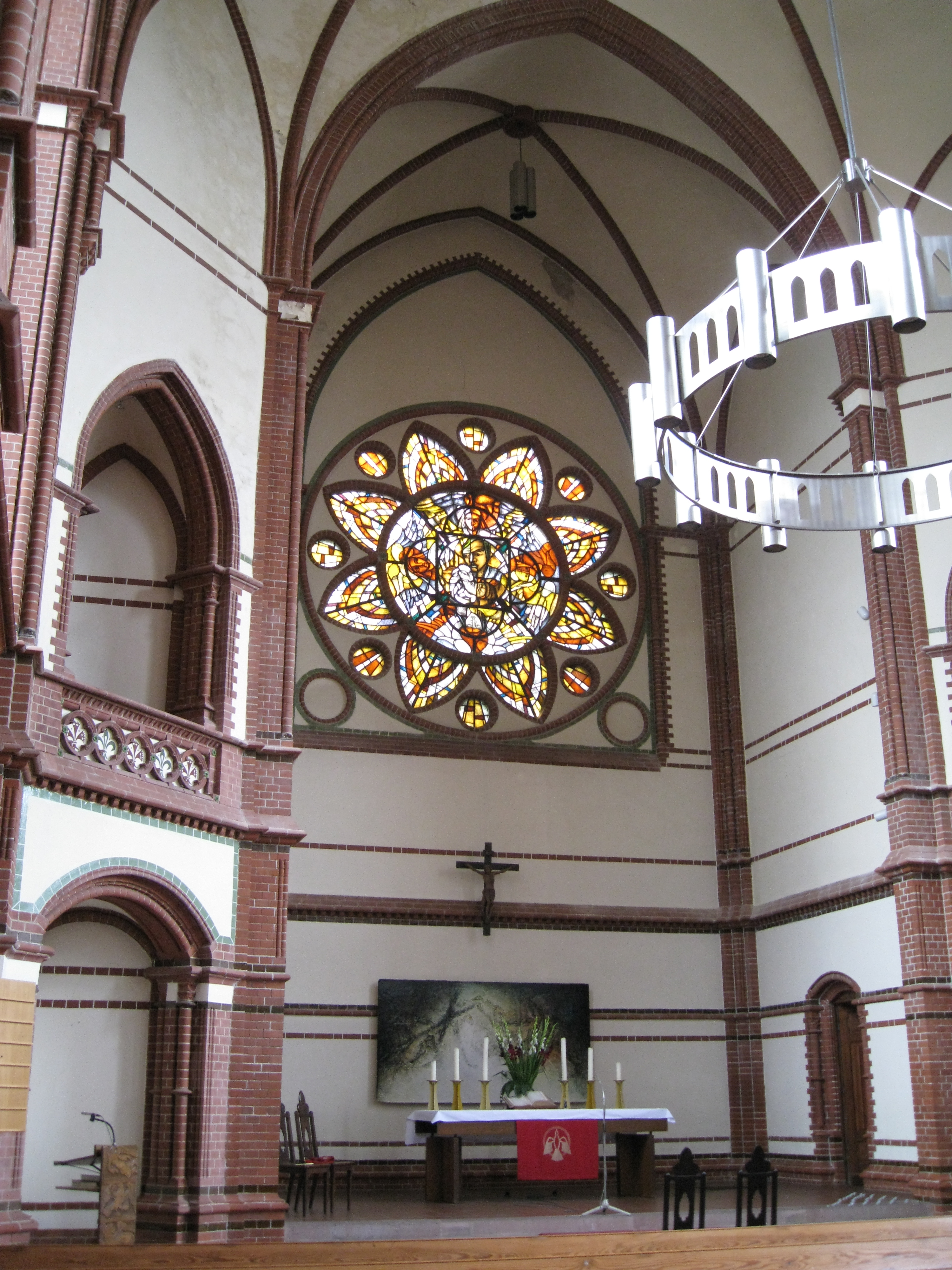 Chor der Kirche Zum Guten Hirten Berlin-Friedenau